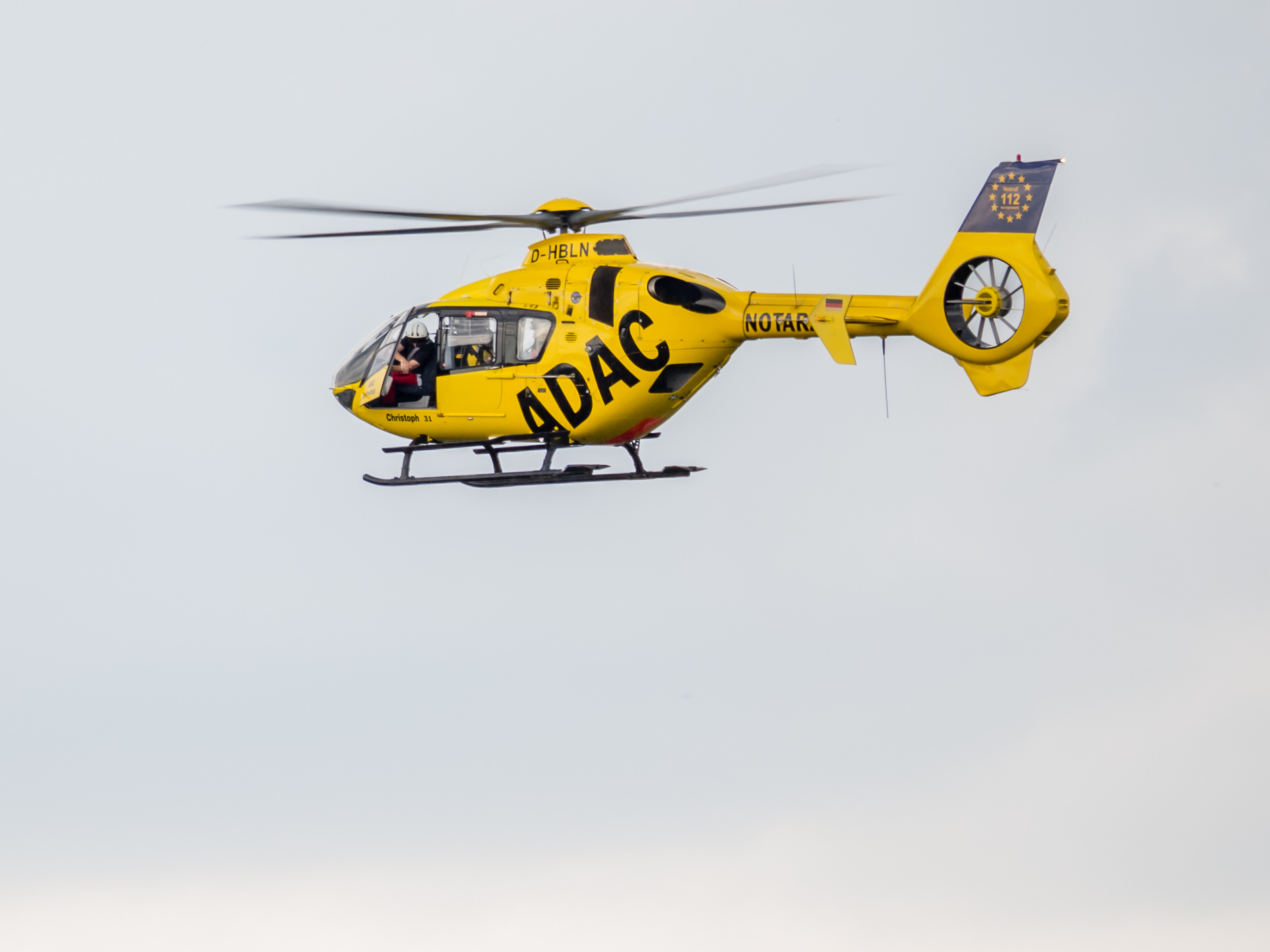 Christoph 31 in Berlin-Lichtenrade